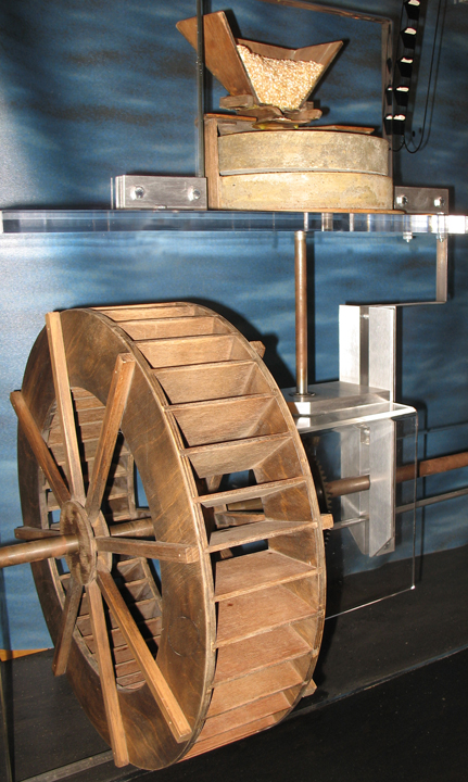 Maquette du mécanisme de transmission de la roue à aubes vers la meule à grains située à l’étage supérieur. Moulin des Jésuites, Ville de Québec (Québec) Canada. Le Moulin des Jésuites de Charlesbourg est un moulin à eau situé à Québec, à l’est de l'arrondissement historique de Charlesbourg (Trait-Carré). Il a été construit en pierre en 1740 et a cessé de fonctionner en 1940. Il abrite aujourd'hui un centre d'interprétation historique.